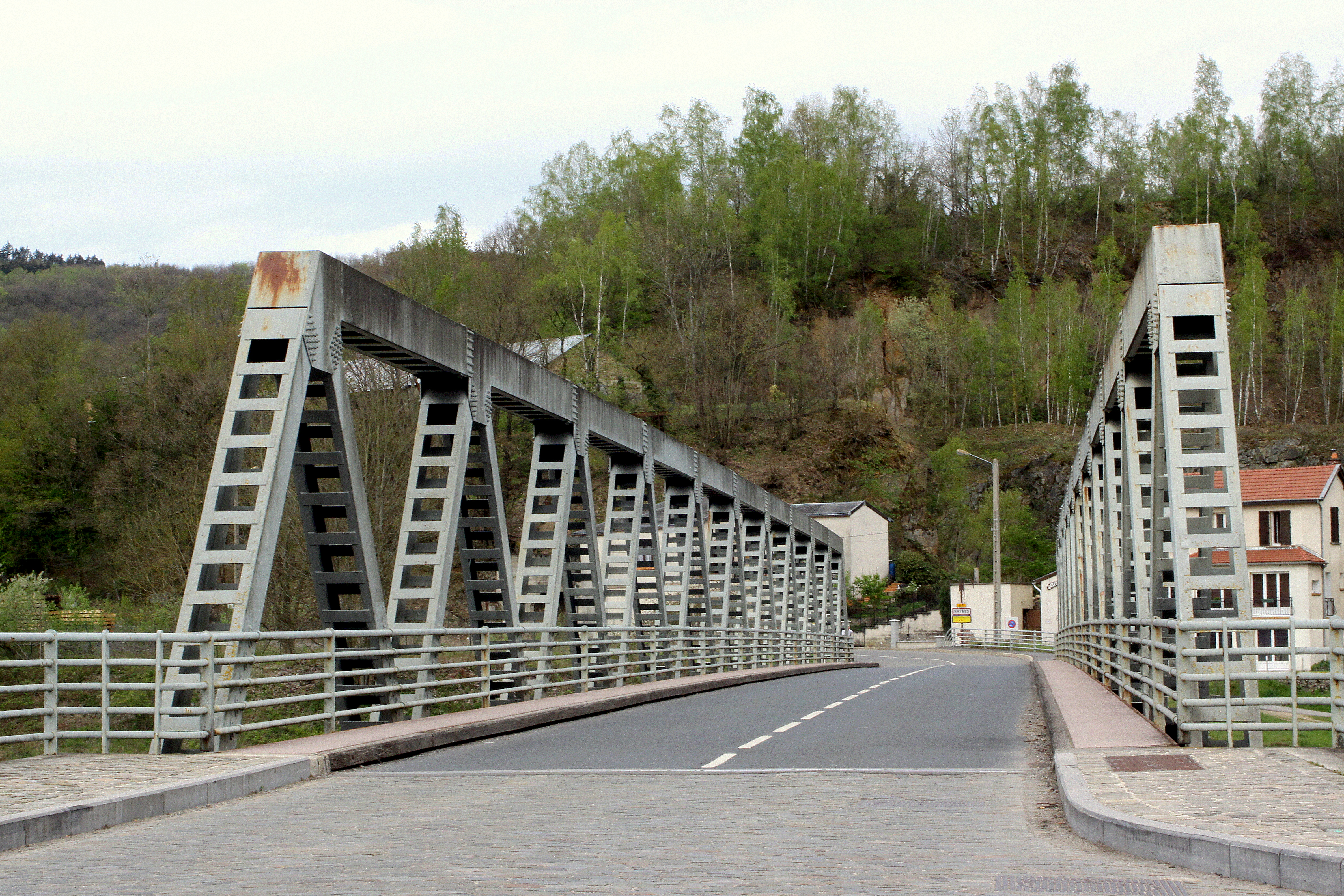 Vue op d'Bréck an Direktioun Haybes